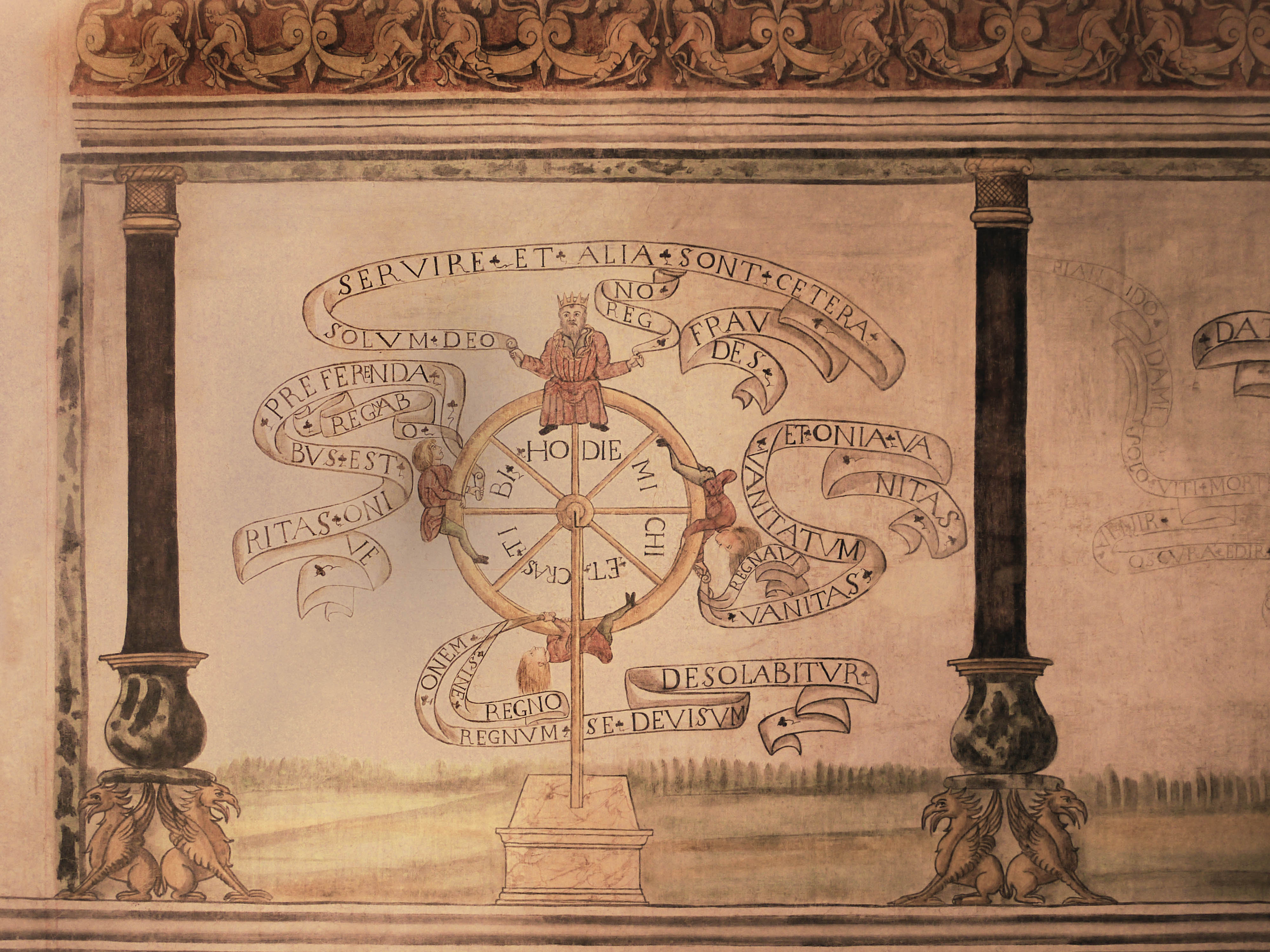 Ca' Cappello (XV sec), Affresco "Rota Fortuna" - Meolo (VE)